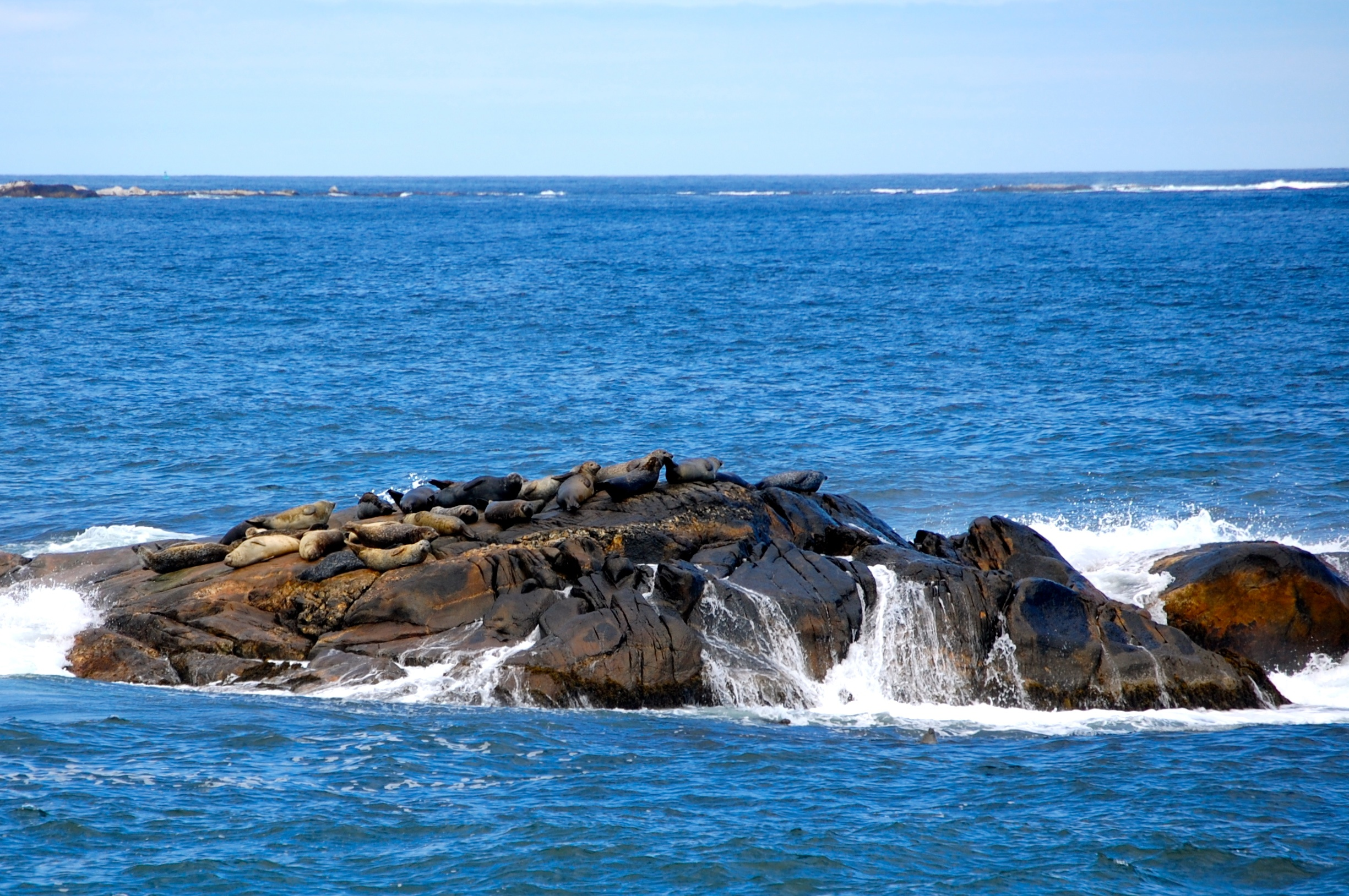 Phoque commun (Phoca vitulina) sur un rocher du parc national de Kejimkujik (annexe côtière)